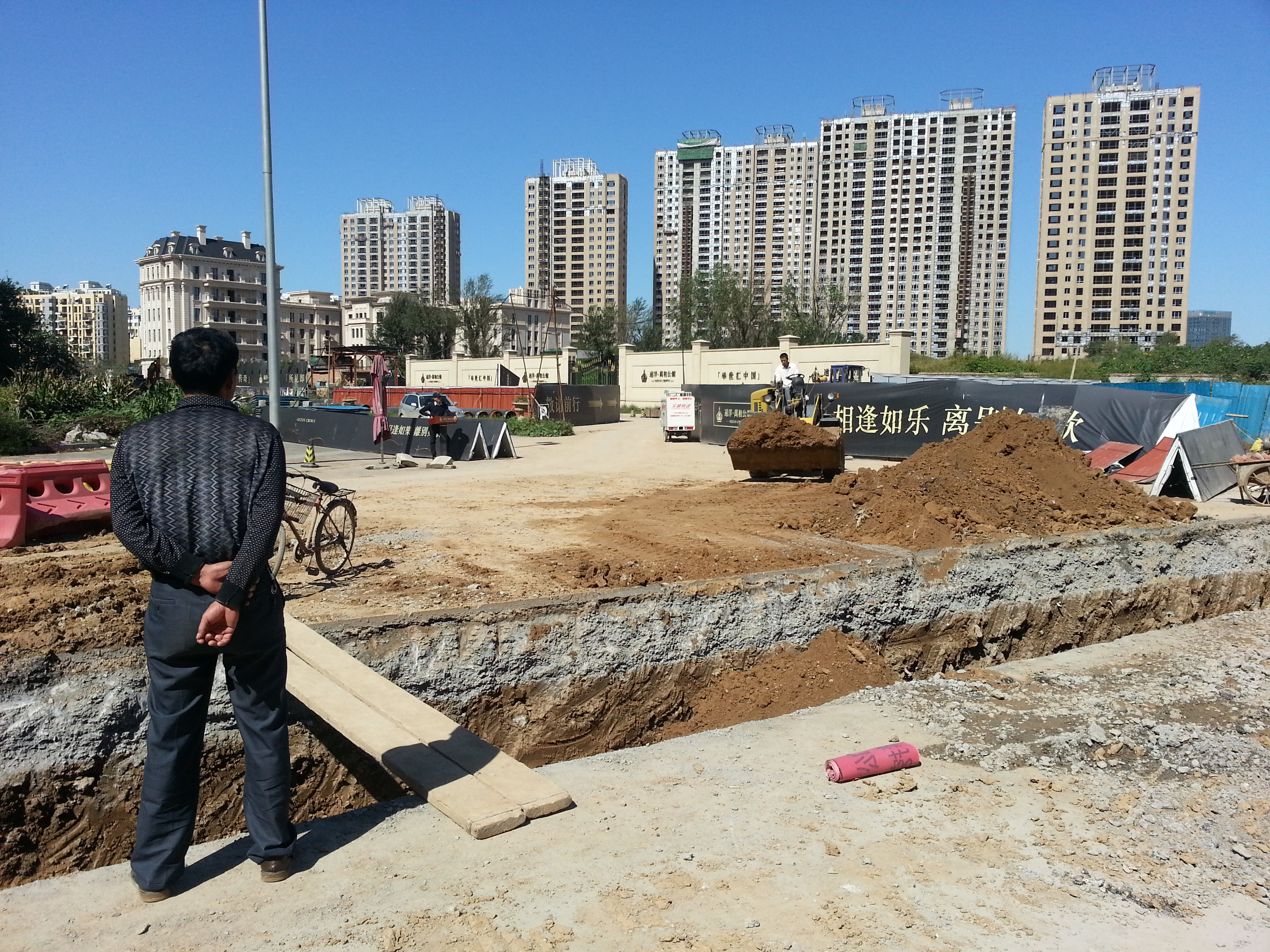 大望京商务区工地，豪宅远洋万和公馆几近竣工，但是适合行人步行的道路却离得似乎还很遥远